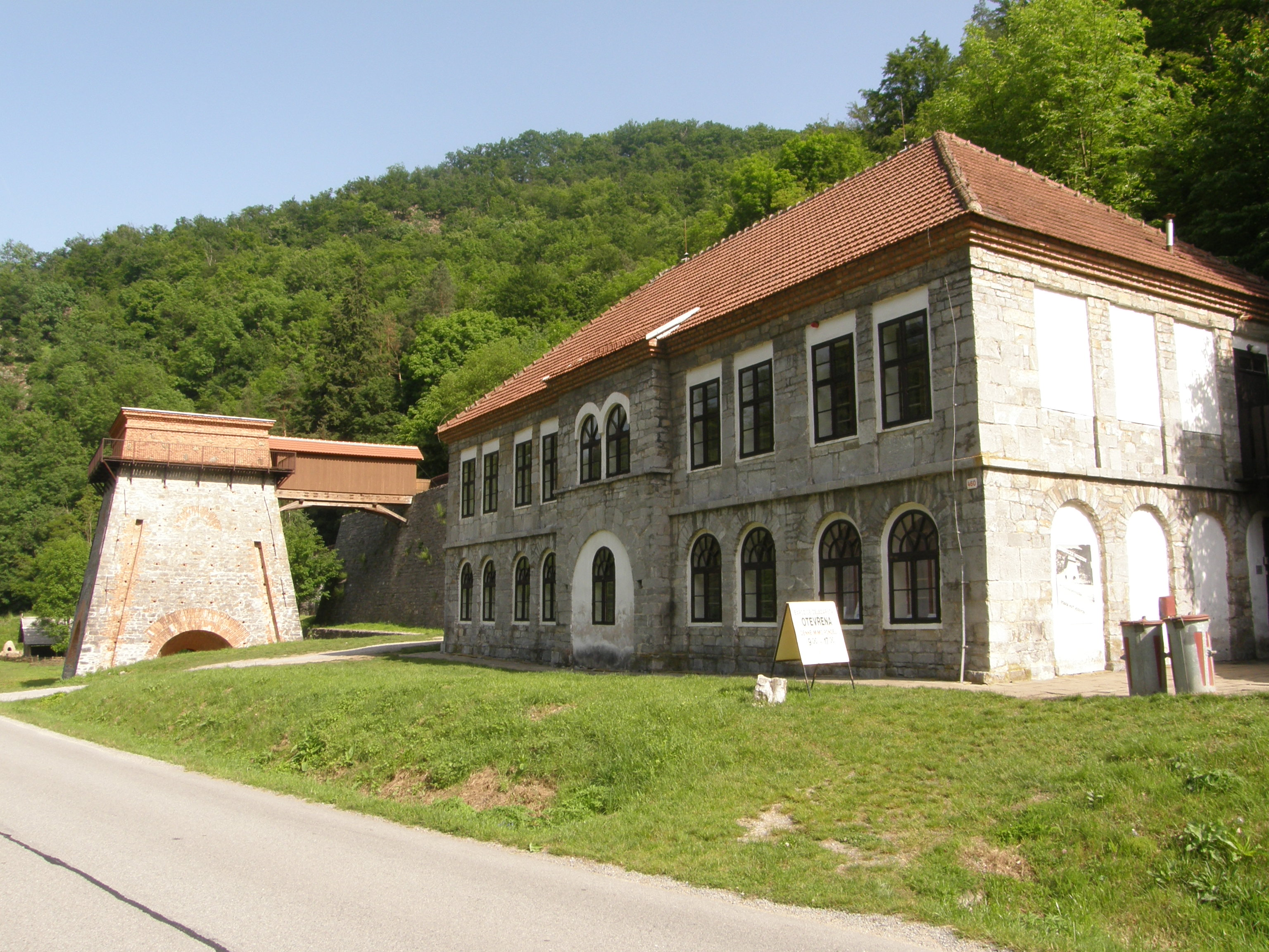 Museum a Stará huť u Adamova